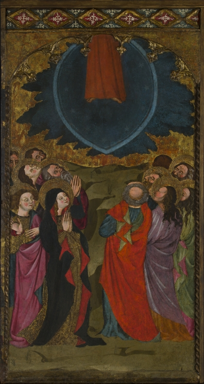 La obra representa la ascensión de Jesucristo a los Cielos después de haber resucitado de entre los muertos.